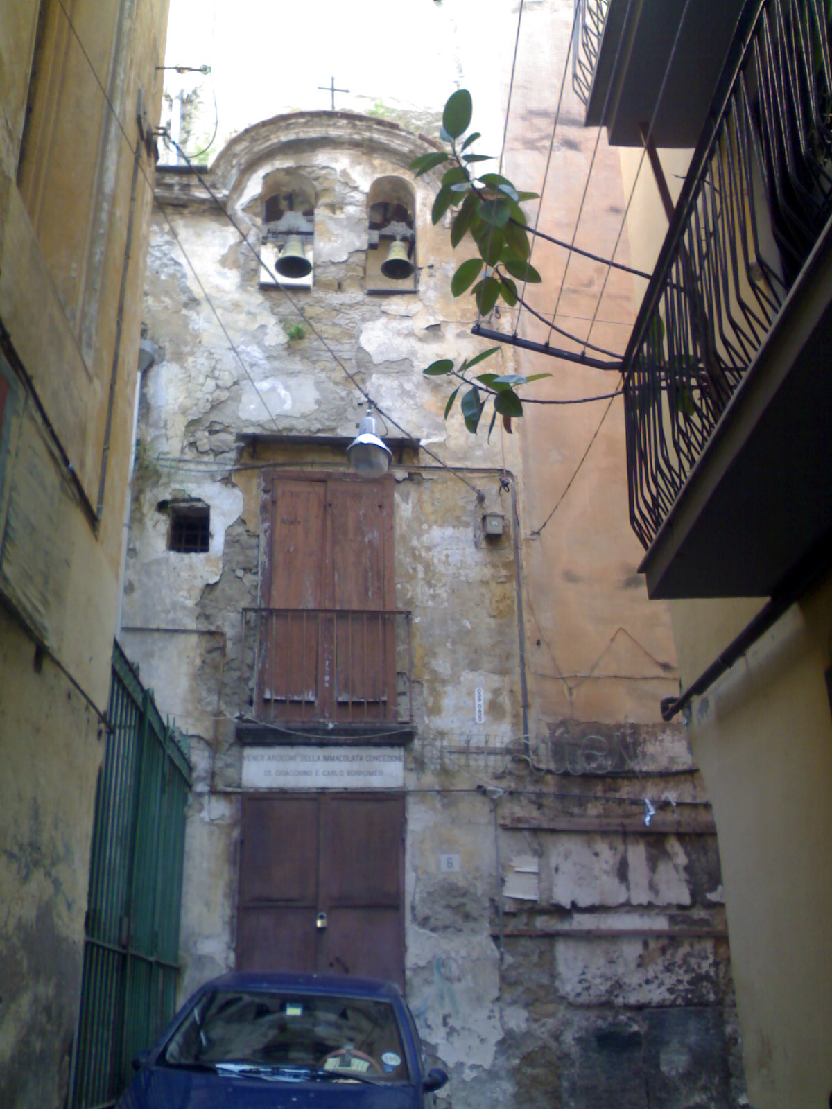 Secondo ingresso della chiesa di Santa Luciella (Napoli)